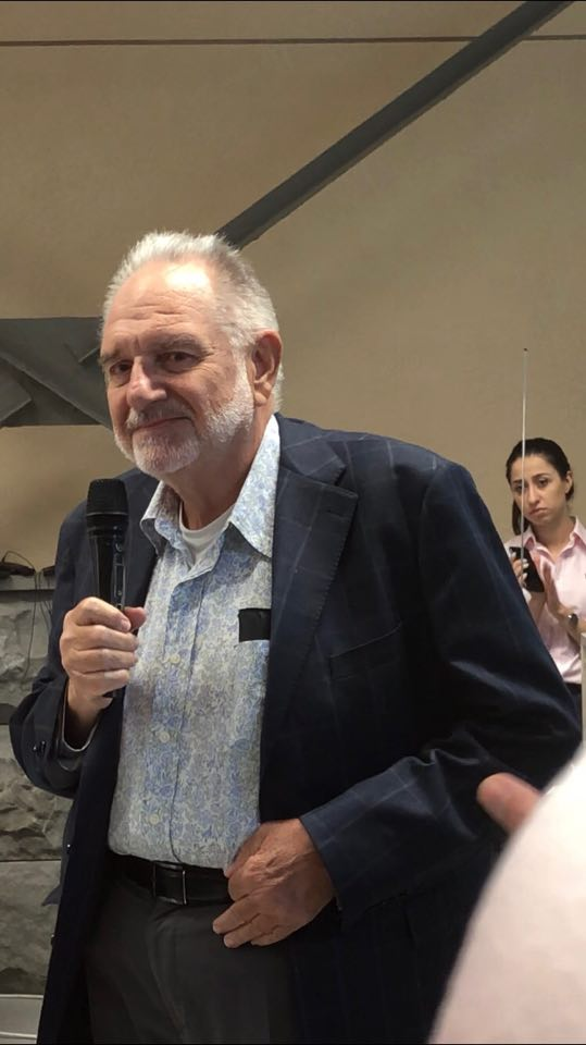 Armenian-American archeologist and historian Gregory Areshian at American University of Armenia